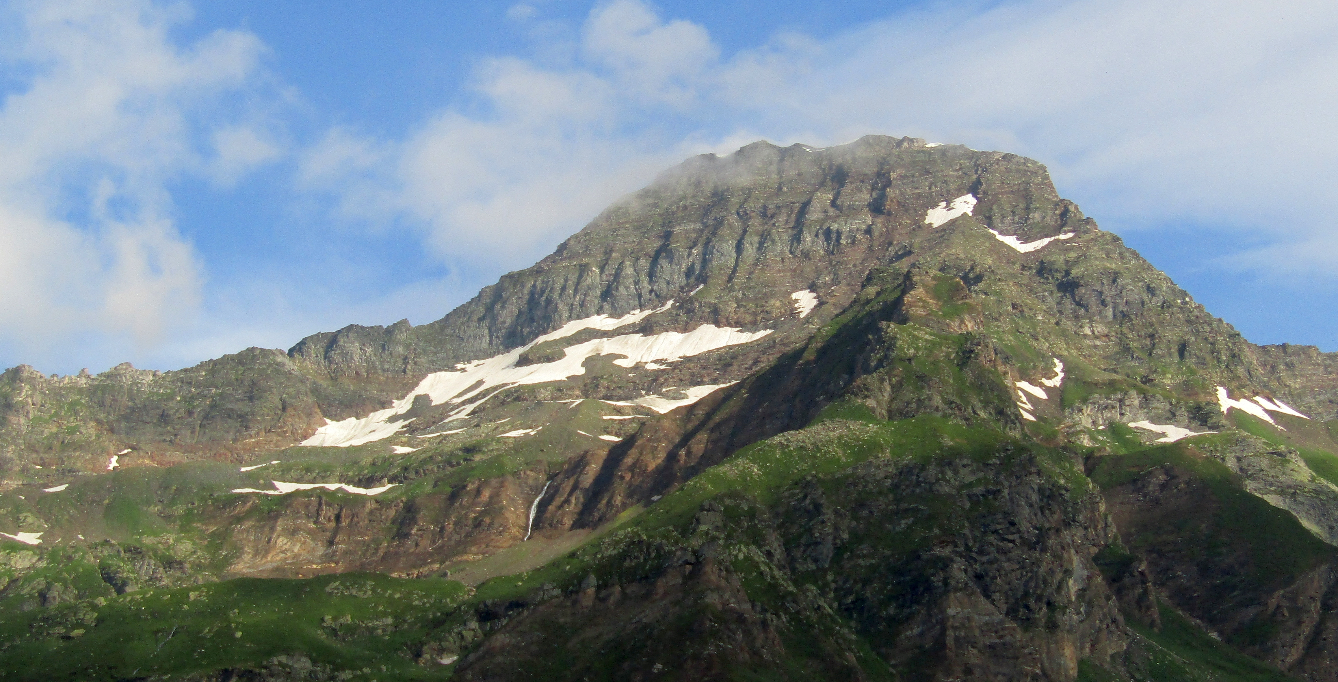 La Punta del Rebbio vista dall'Alpe Veglia (Alpi Lepontine)